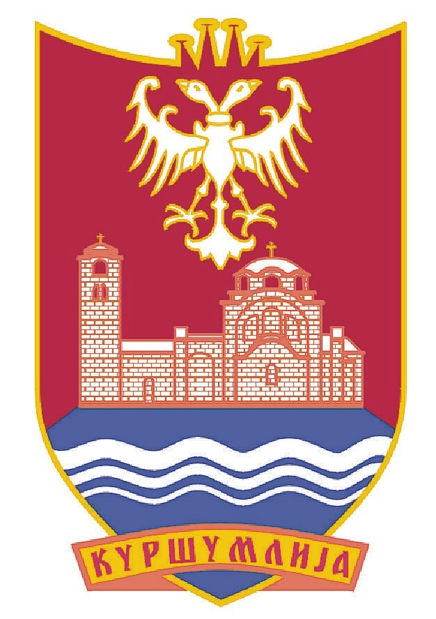 Coat of arms of Kuršumlija, Serbia/Blason de la ville de Kuršumlija, Serbie